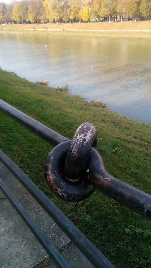 Пам'ятний знак в честь Івана Фірцака - Ужгород, Київська набережна